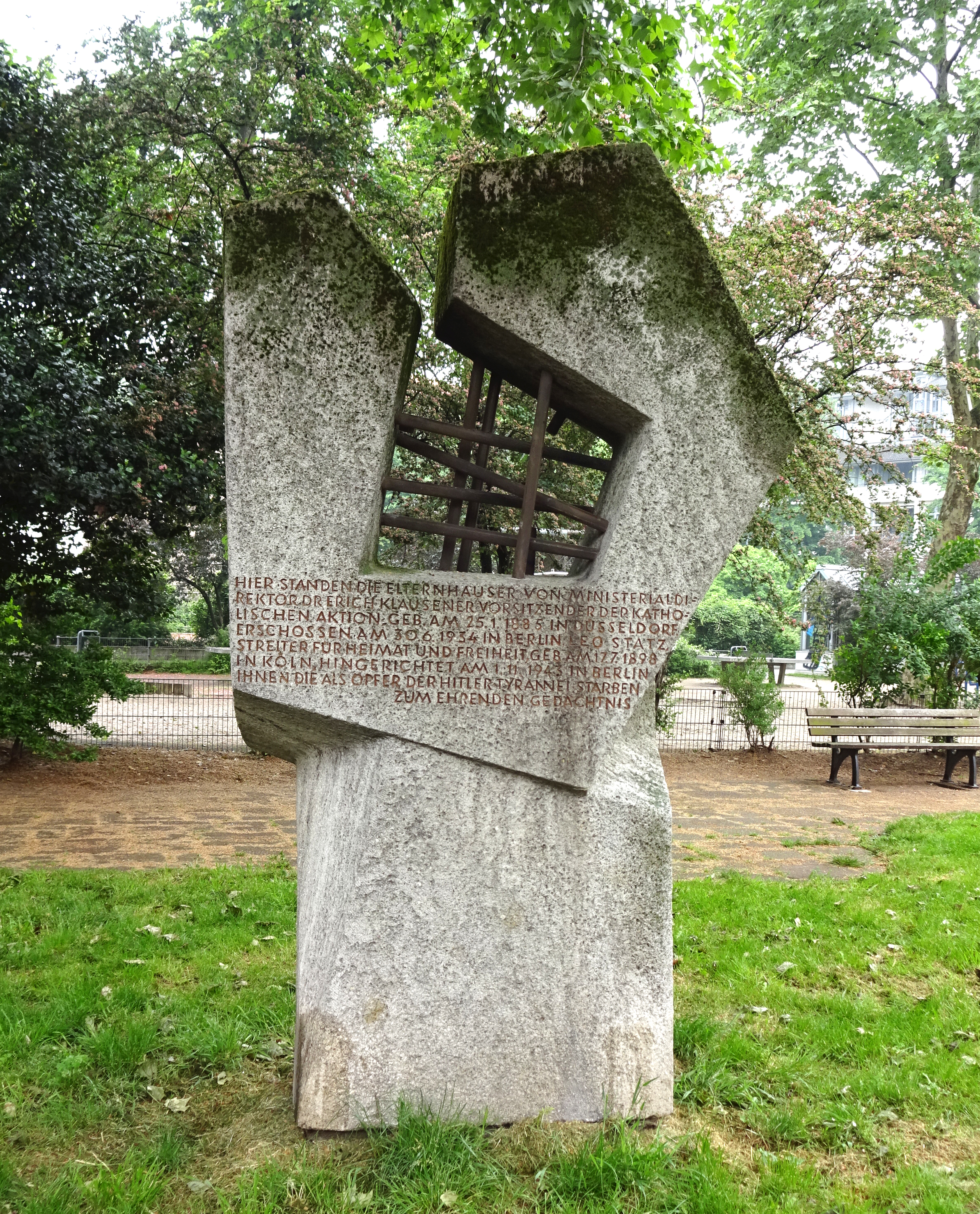 Gedenkstein auf dem Leo-Statz-Platz in Unterbilk, am ehemaligen Standort des Hauses Kronprinzenstraße 43 (Geburtshaus von Erich Klausener und Eigentum des Vaters von Leo Statz). Der Entwurf für das aus Muschelkalk gefertigte 2,6 Meter hohe Denkmal stammt von Günter Haese. Haeses Entwurf wurde 1963 vom Bildhauer Wolfgang Kuhn umgesetzt. Inschrift: HIER STANDEN DIE ELTERNHÄUSER VON MINISTERIALDIREKTOR DR ERICH KLAUSENER VORSITZENDER DER KATHOLISCHEN AKTION, GEB. AM 25.1.1885 IN DÜSSELDORF. ERSCHOSSEN AM 30.6.1934 IN BERLIN. LEO STATZ, STREITER FÜR HEIMAT UND FREIHEIT, GEB. AM 17.7.1898 IN KÖLN, HINGERICHTET AM 1.11.1943 IN BERLIN IHNEN DIE ALS OPFER DER HITLERTYRANNEI STARBEN ZUM EHRENDEN GEDÄCHTNIS